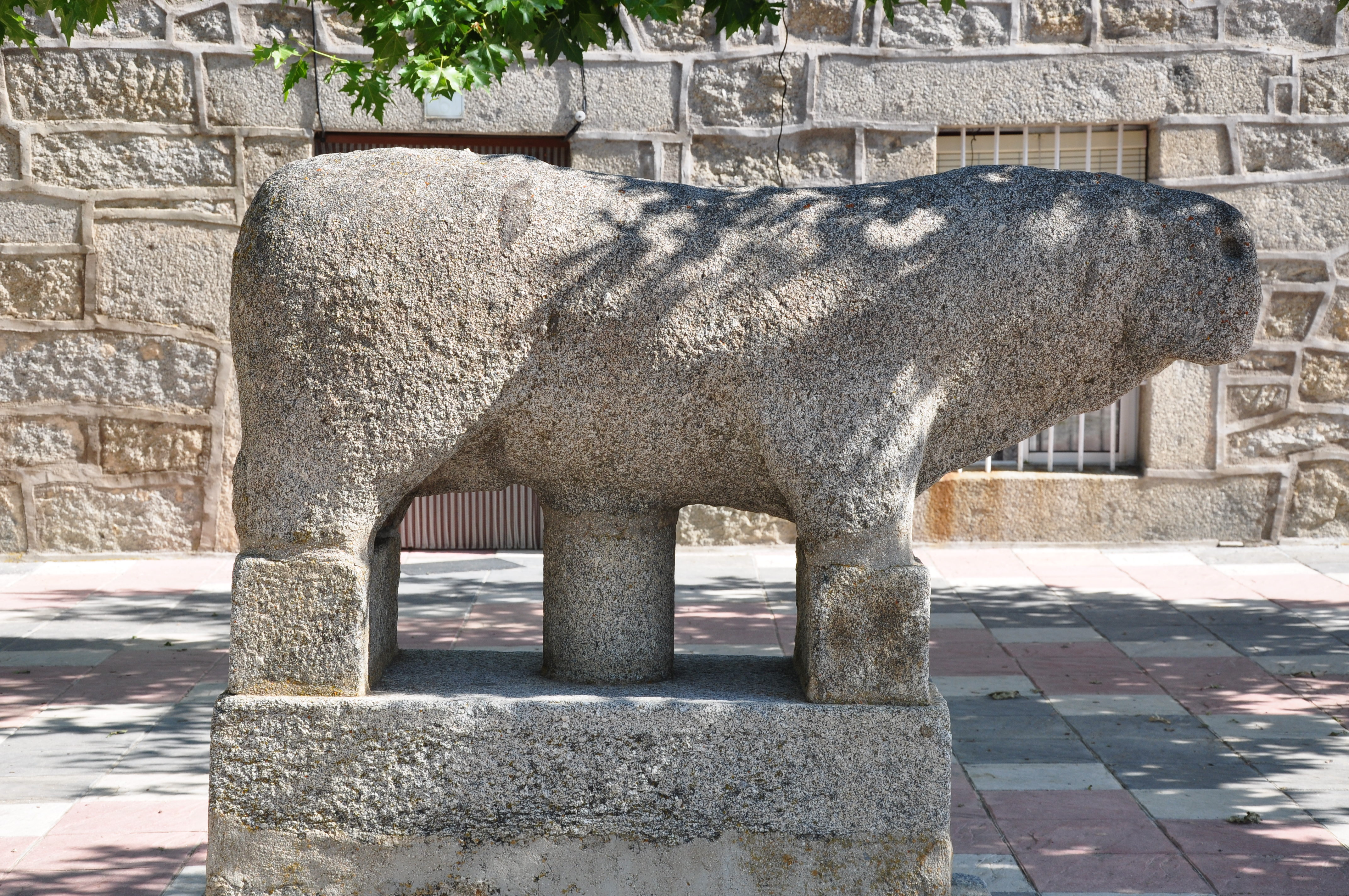 Verraco procedente del Castro vetón de la Mesa de Miranda en Chamartín (Ávila), España.